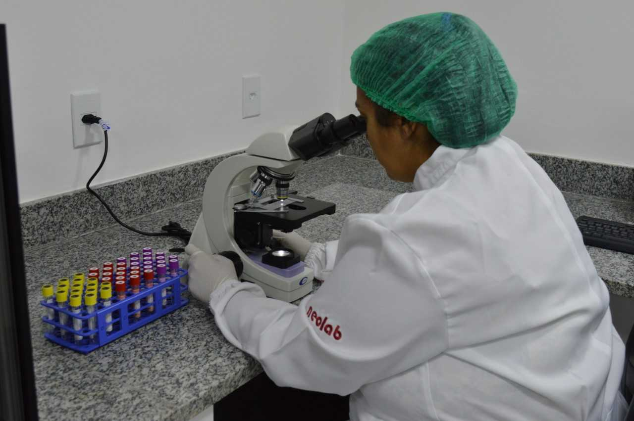 Laboratório de Análises Clínicas/Neolab